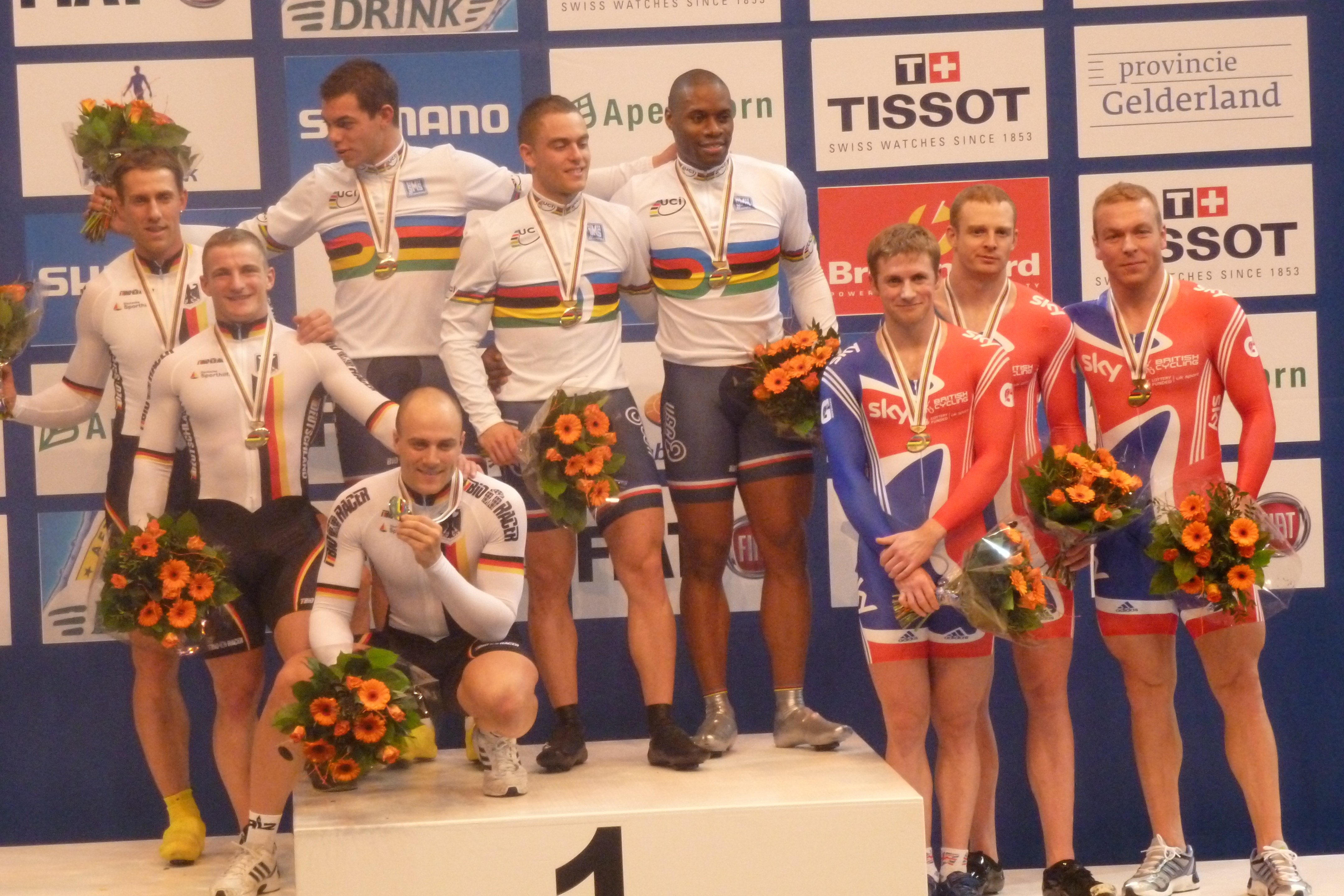 Bahn-WM Apeldoorn 2011, Podium Teamsprint v.l.n.r. Stefan Nimke, René Enders, Kévin Sireau, Maximilian Levy (vorne), Michaël D'Almeida, Grégory Baugé, Jason Kenny, Matthew Crampton, Chris Hoy